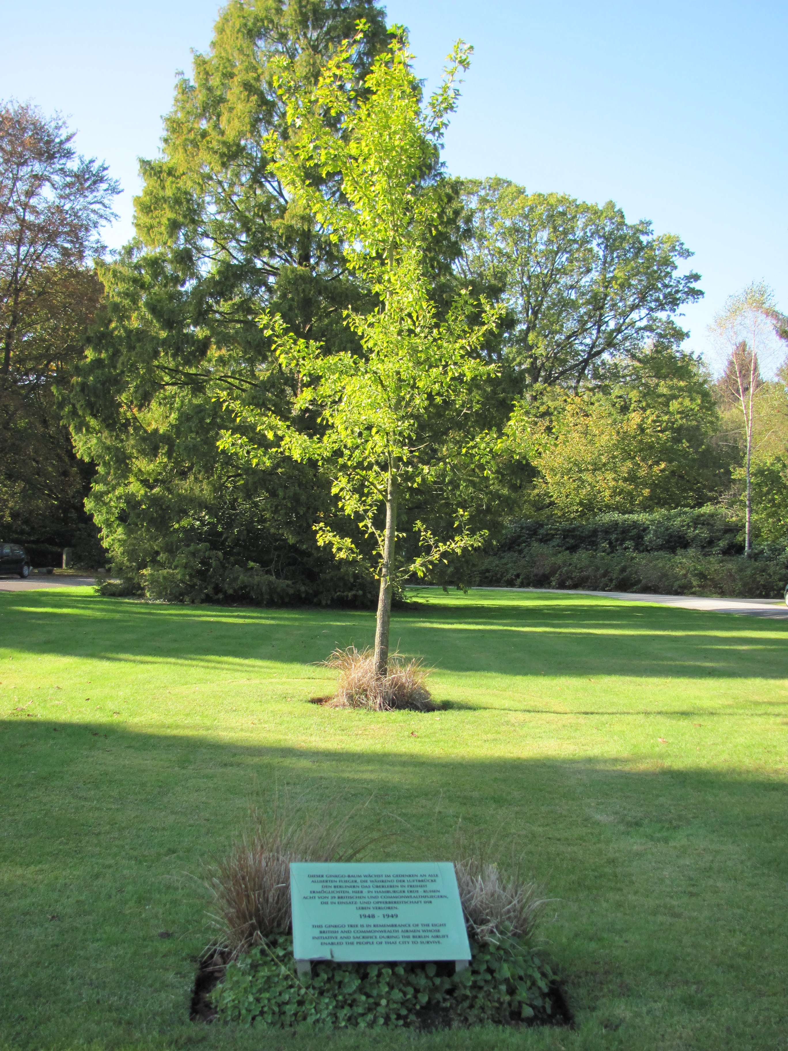 Gingko zur Erinnerung an die alliierten Flieger bei der Luftbrücke während der Berlin-Blockade auf dem Friedhof Ohlsdorf